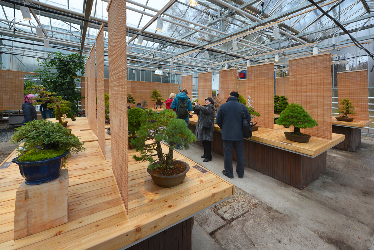 Выставка бонсай "Мир в глиняной плошке" 2015/16